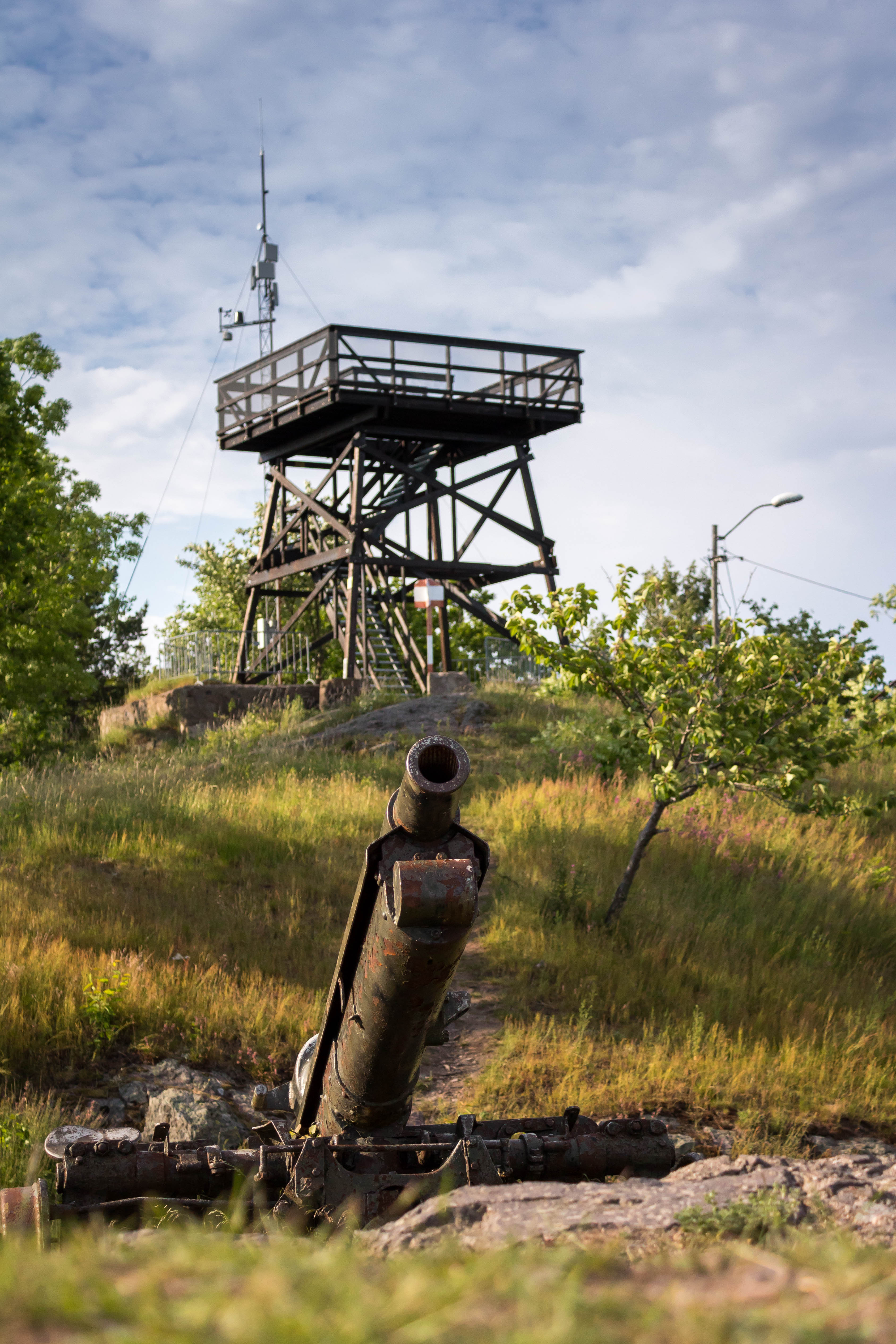 Kanon og utsiktstårnet på festningen i Horten